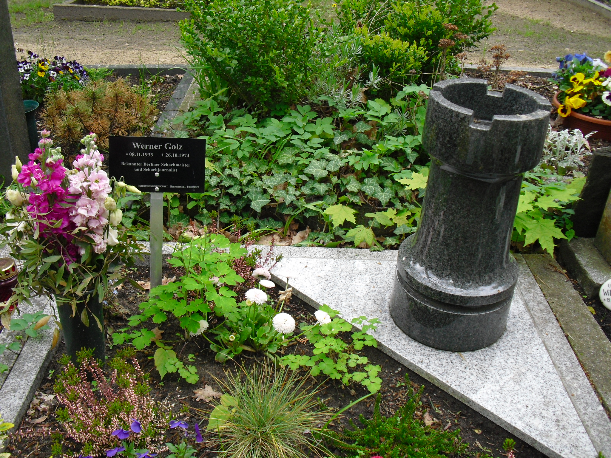 Grab des Schachspielers und Schachjournalisten Werner Golz auf dem Karlshorster und Neuen Friedrichsfelder Friedhof in Berlin-Karlshorst